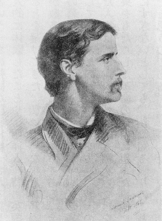 Samuel Lawrenceが描いた、Algernon Freeman-Mitford, 1st Baron Redesdale、28歳当時（1865年）の肖像画です。オリジナルの所在はわかりません。